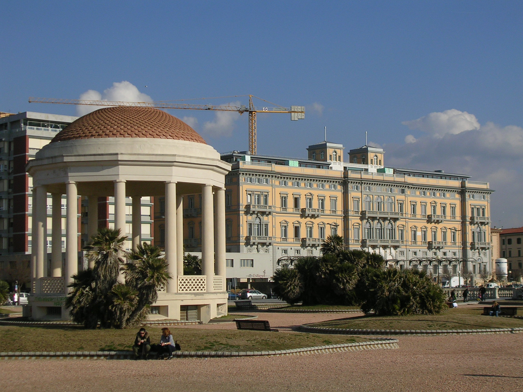 Livorno: il Gazebo (di Ghino Venturi) del lungomare e l'Hotel Palazzo.